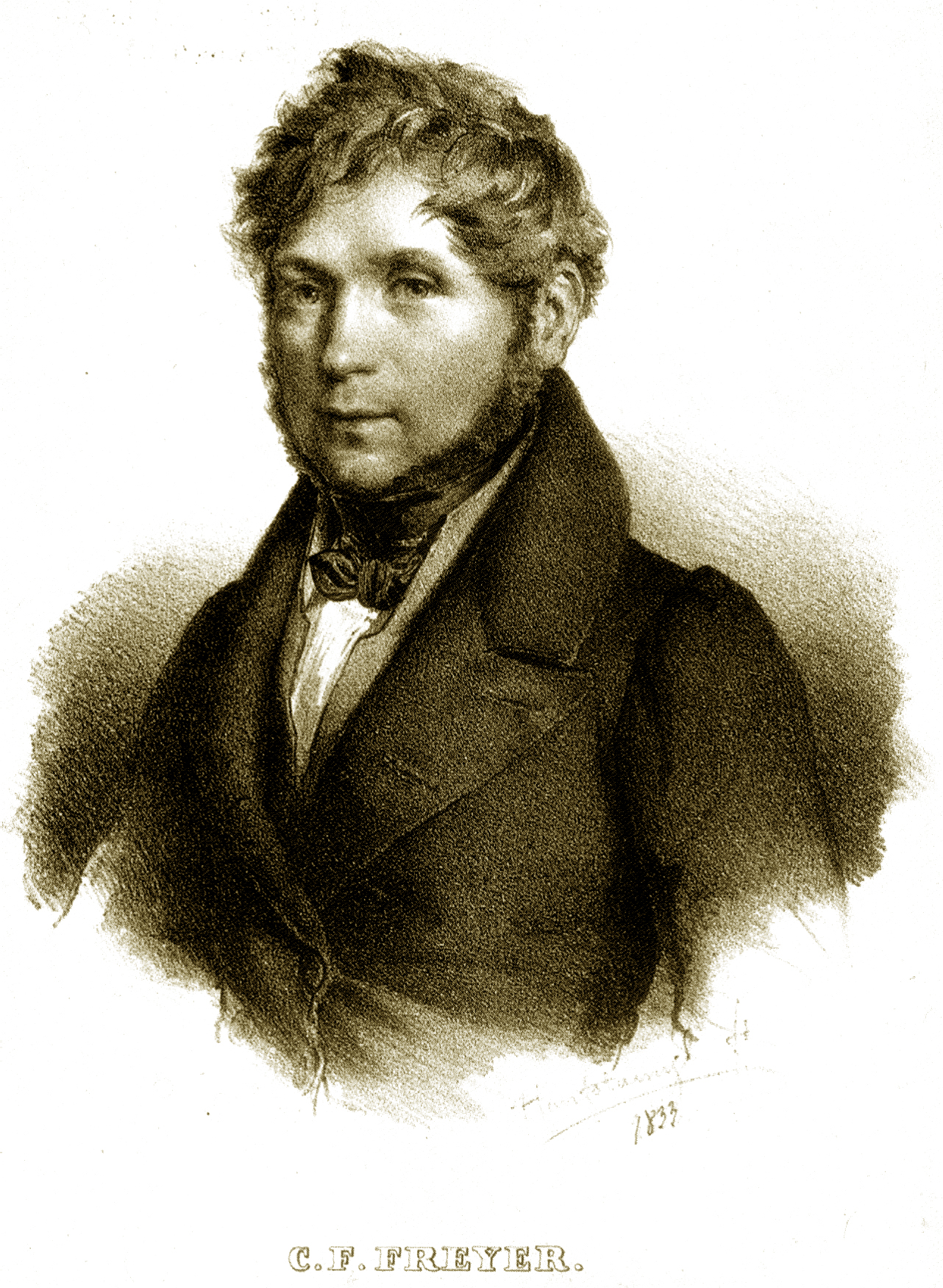 portrait des illustrators c.f.freyer 1833